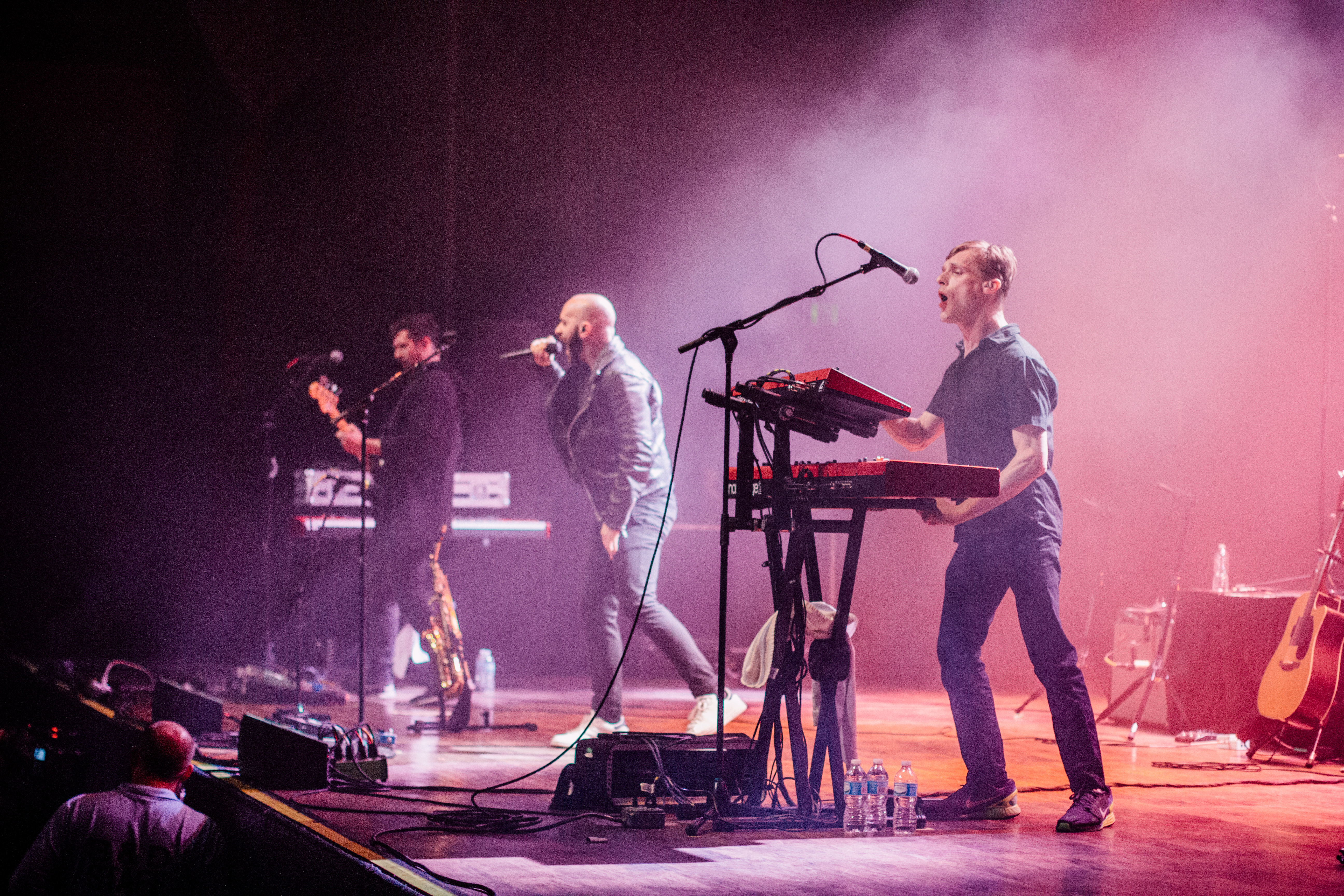 X_Ambassadors-3242